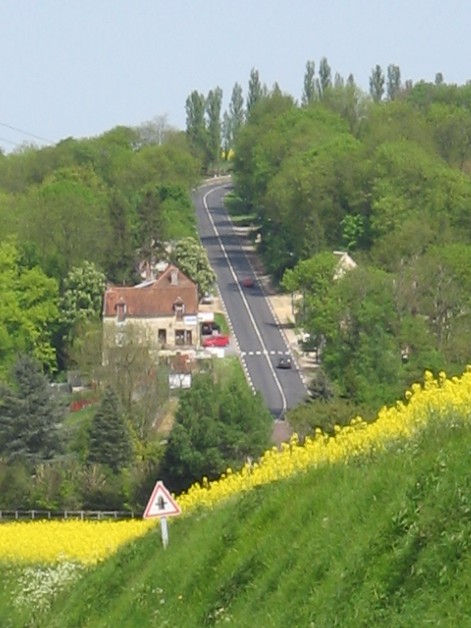 Rue de Compiègne